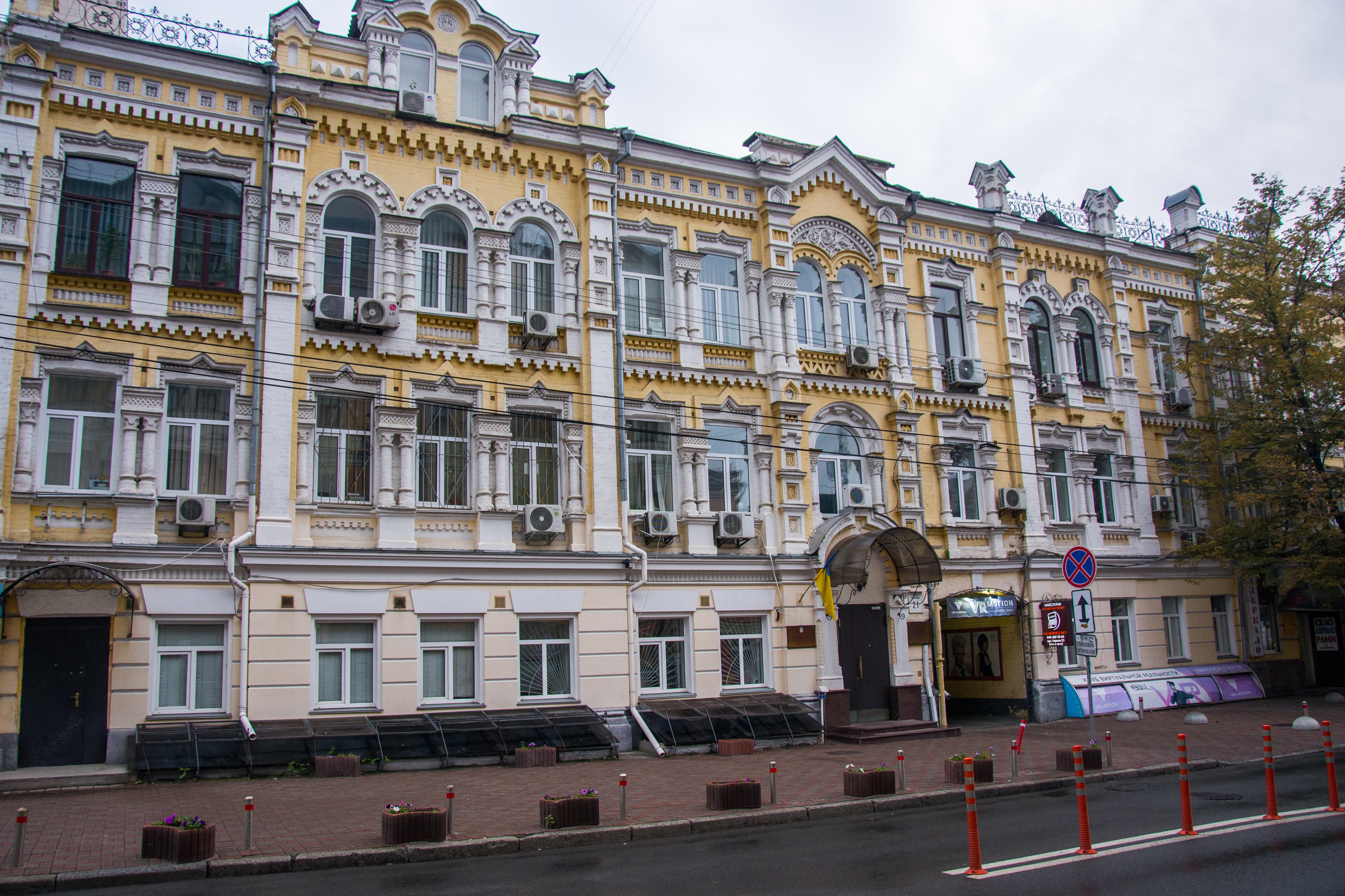 Будинок прибутковий (Флігель), Київ, Хорива вул., 21 (21/23)